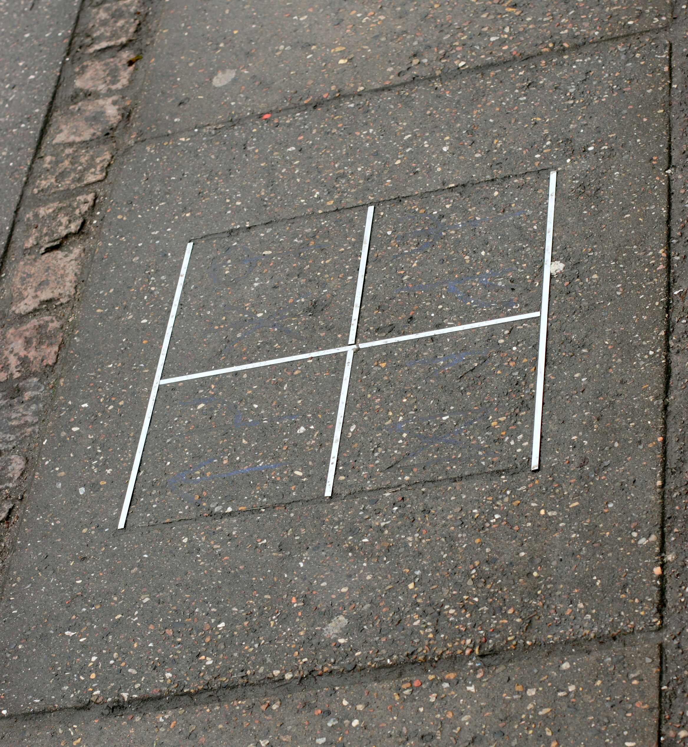 Udsmykket fortovsflise i Århus.